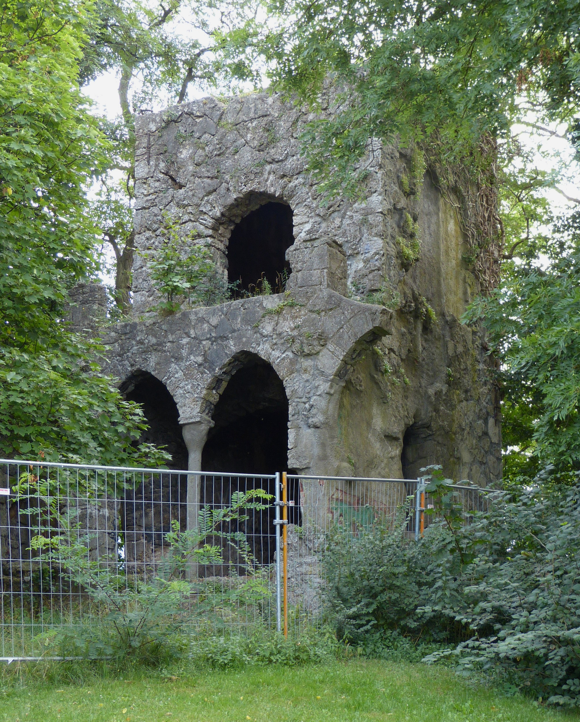 Staffage in Bremen, Friedrich-Klippert-Straße 5Das abgebildete Objekt ist ein geschütztes Kulturdenkmal in der Freien Hansestadt Bremen, mit der Nr. 1984 beim Landesamt für Denkmalpflege registriert.